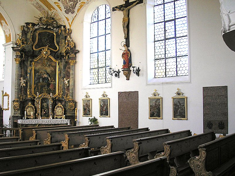 Wallfahrtskirche Maria Kappel (Schmiechen, Landkreis-Aichach-Friedberg, Bayerisch-Schwaben). Schrägblick ins Langhaus. Eigene Aufnahme, Nov. 2006 / Pilgrimage church Maria Kappel near Schmiechen, Bavaria, Germany). View into the nave. Own photo, Nov. 2006